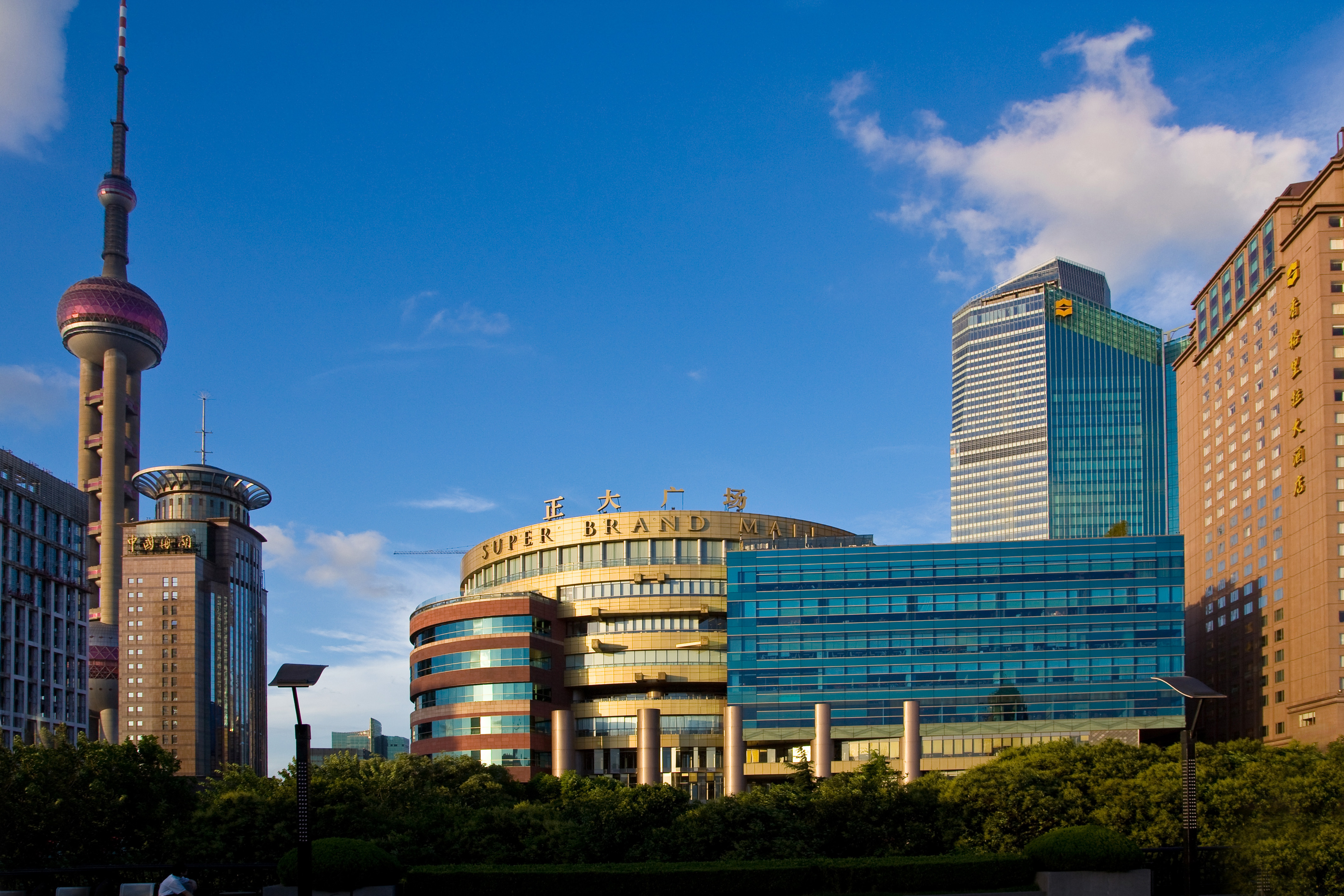 正大广场白天外景